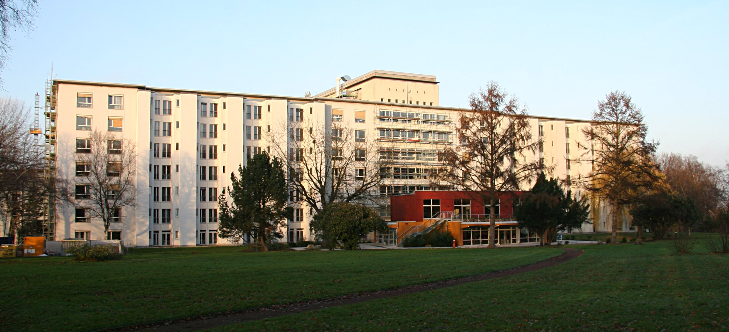 Südseite des Knappschaftskrankenhauses Dortmund. Dortmund, Nordrhein-Westfalen, Deutschland.